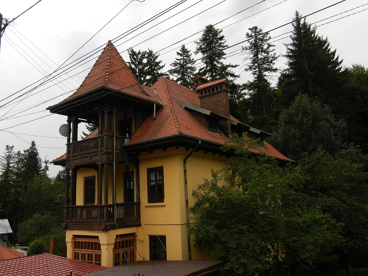 Vila "Doina Peleșului"